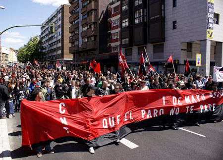 1 de mayo 2009 de la CNT en Madrid.